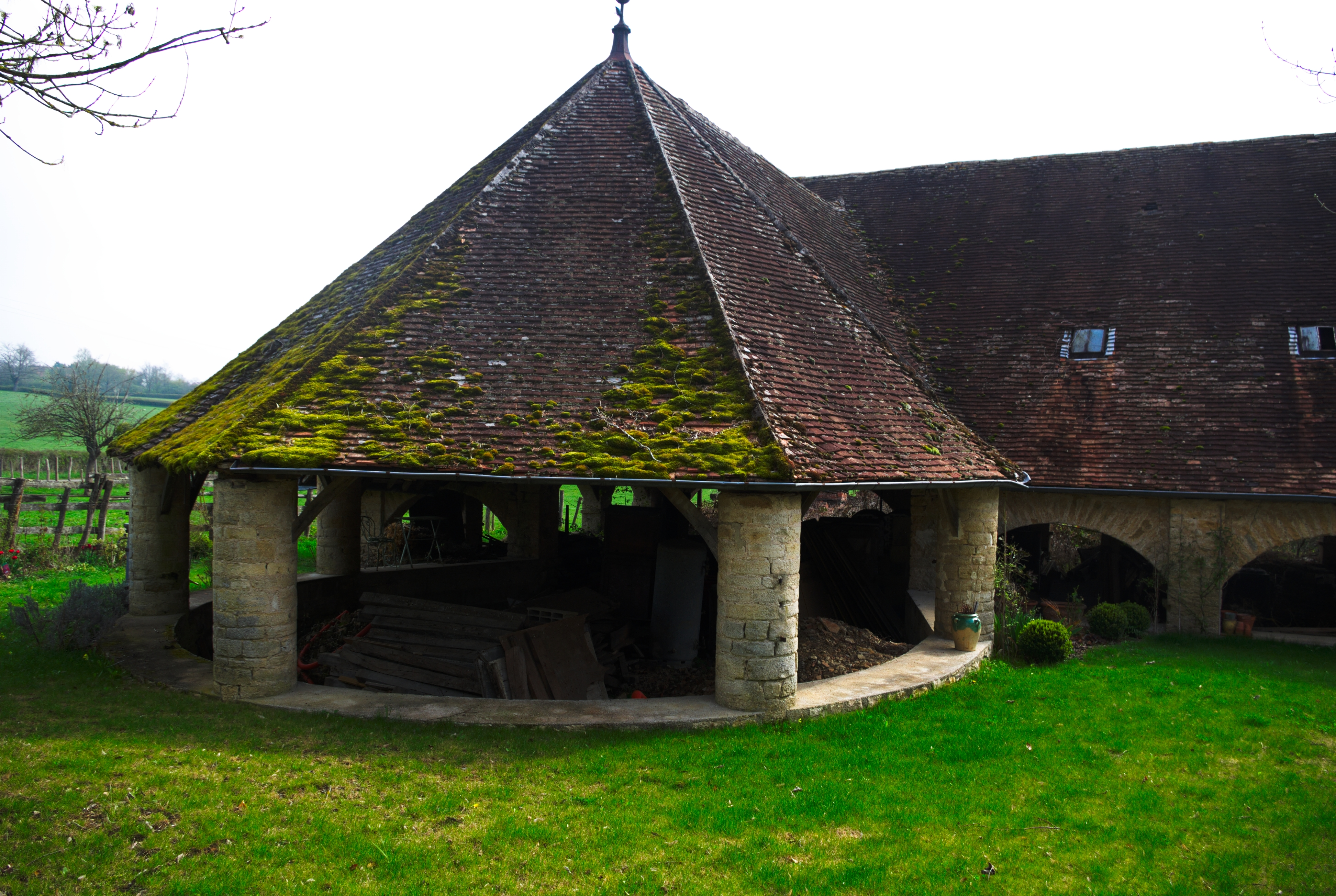 Tuilerie de Bissy